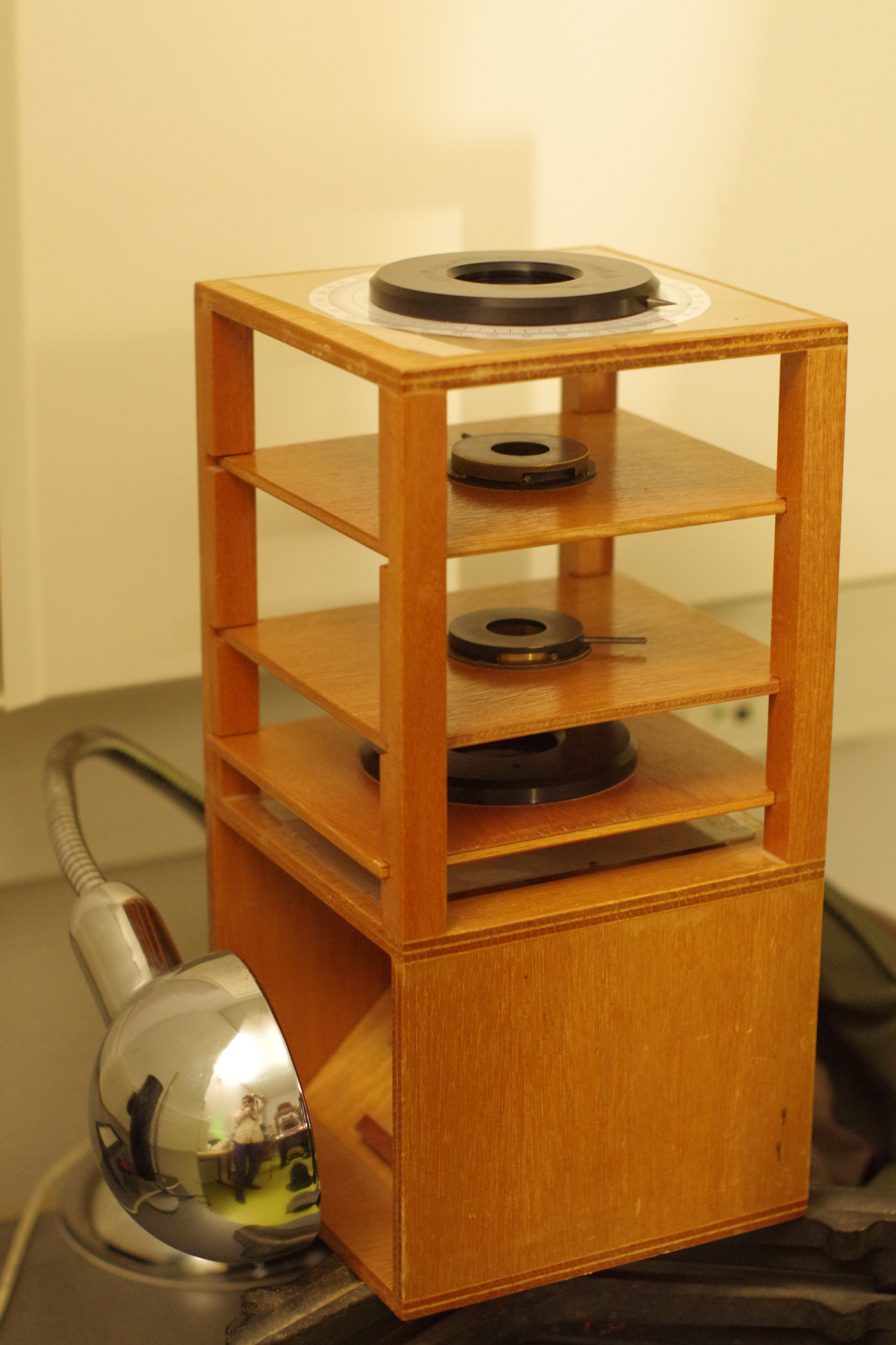 Exemple de banc de polarisation, crédit : SupOptique